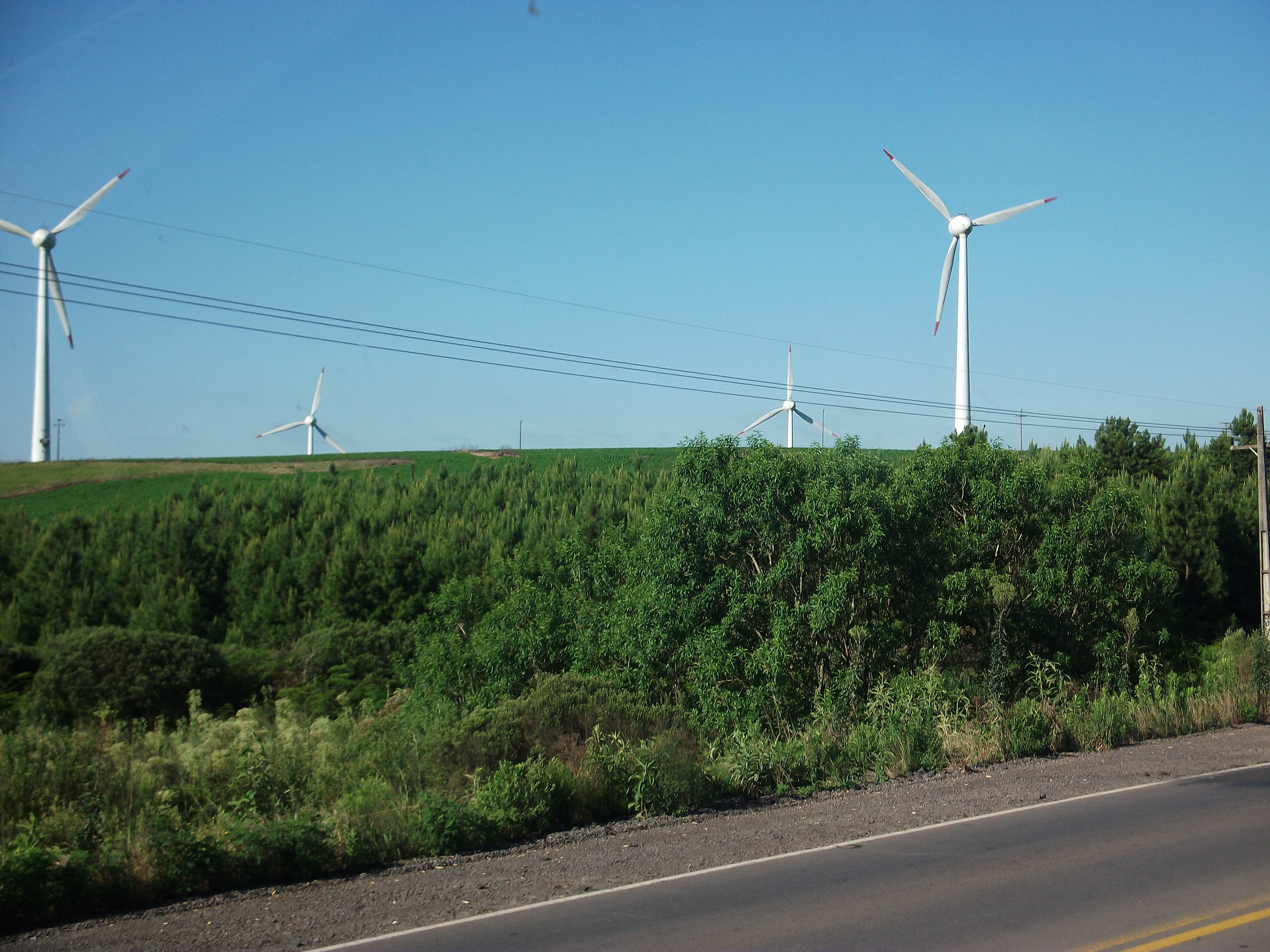 Parque eólico localizado em Palmas (Paraná, BR).